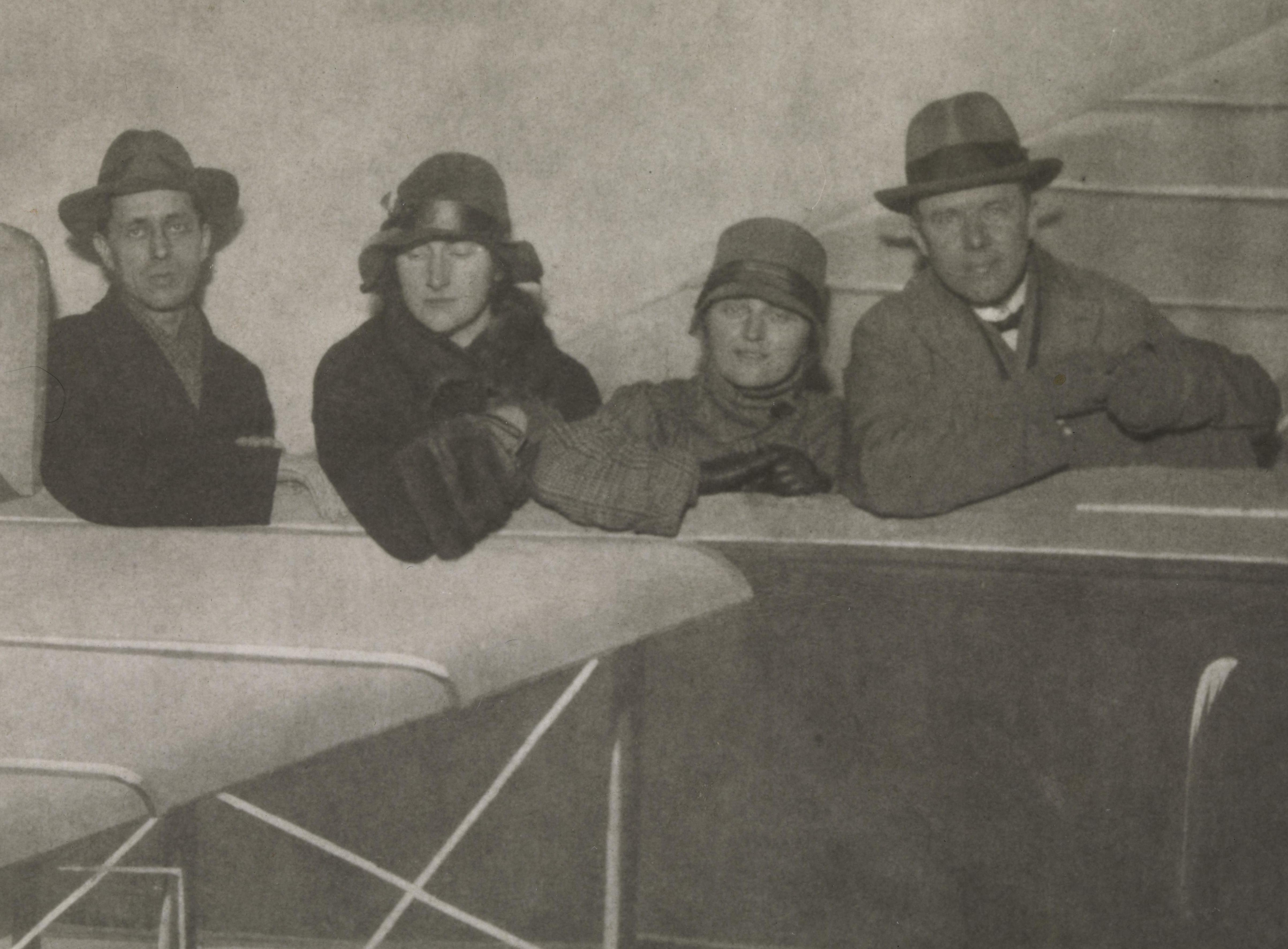 Bildet er hentet fra Nasjonalbibliotekets bildesamling Depicted person: Valen, Fartein